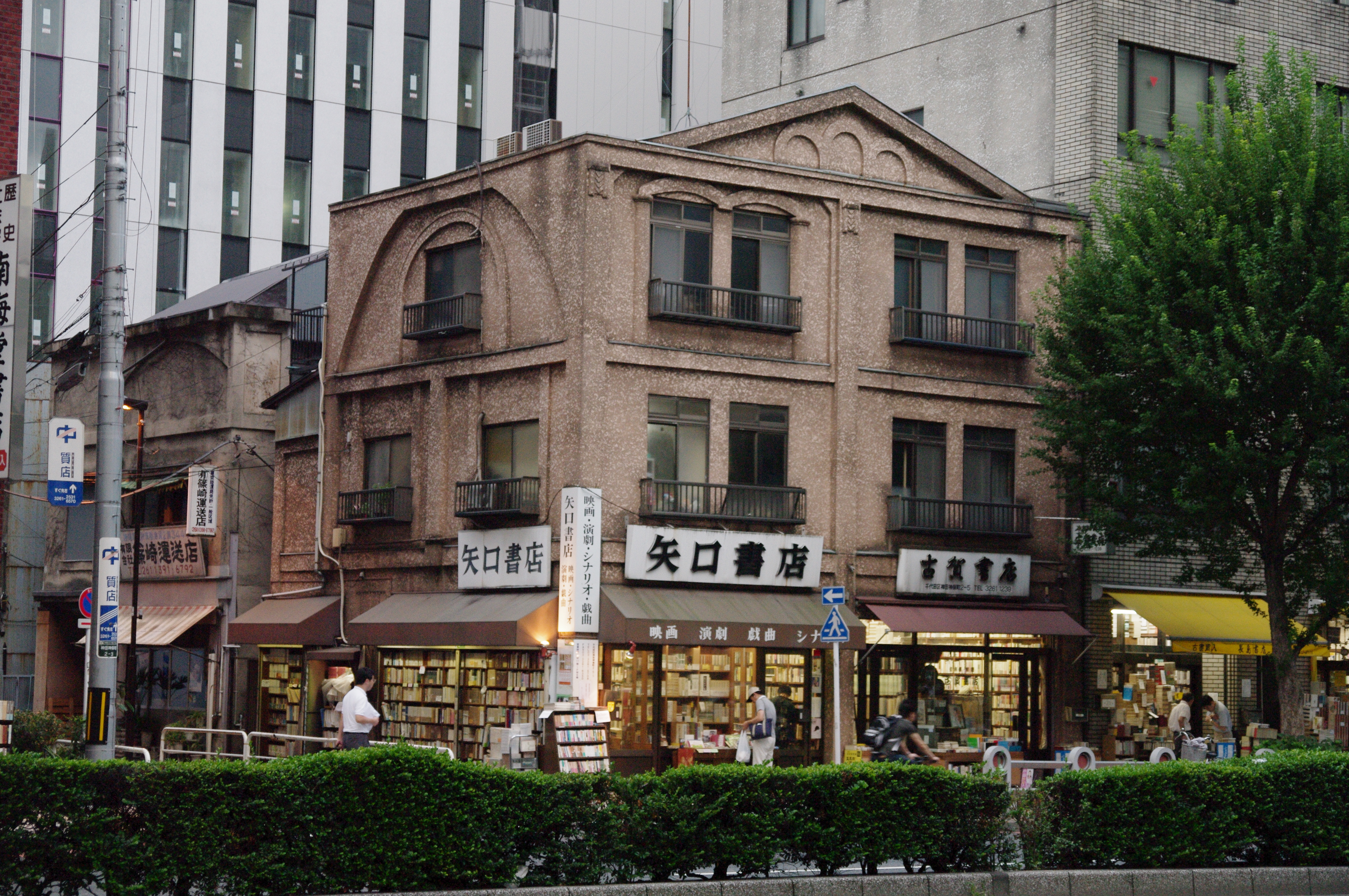 1918年に建てられた神田神保町の矢口書店/古賀書店。